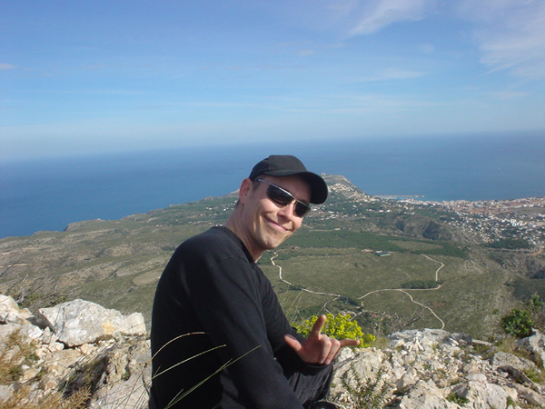 Farin Urlaub (auf der Spitze des Montgó zwischen Denia und Jávea in Spanien)